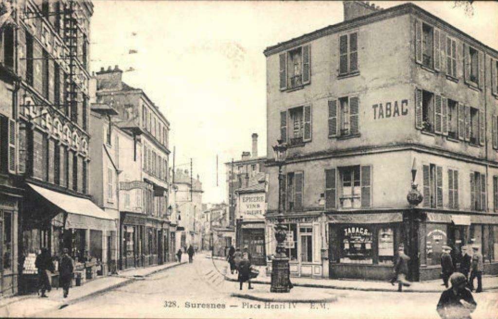 Suresnes.Place Henri IV